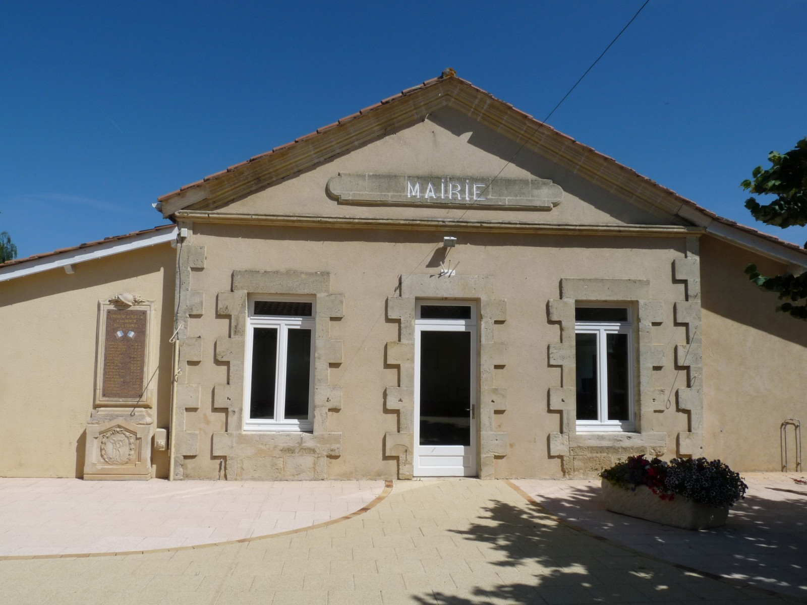 Mairie de Juillac, Gironde, France